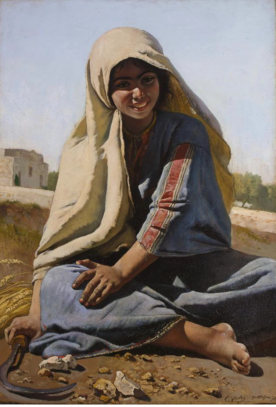 Jeune fille de Bethlehem